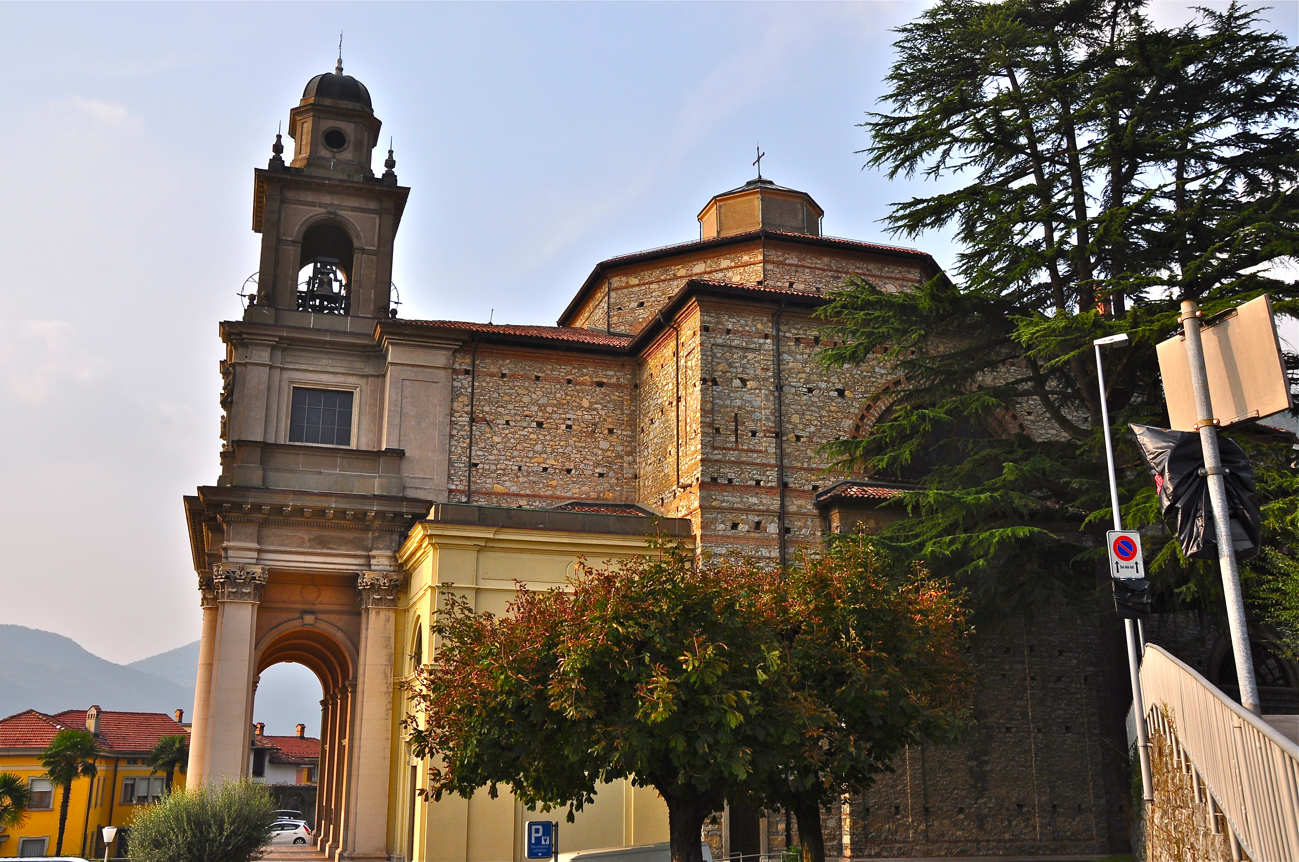 Facciata laterale della chiesa dei Santi Cosma e Damiano a Mendrisio